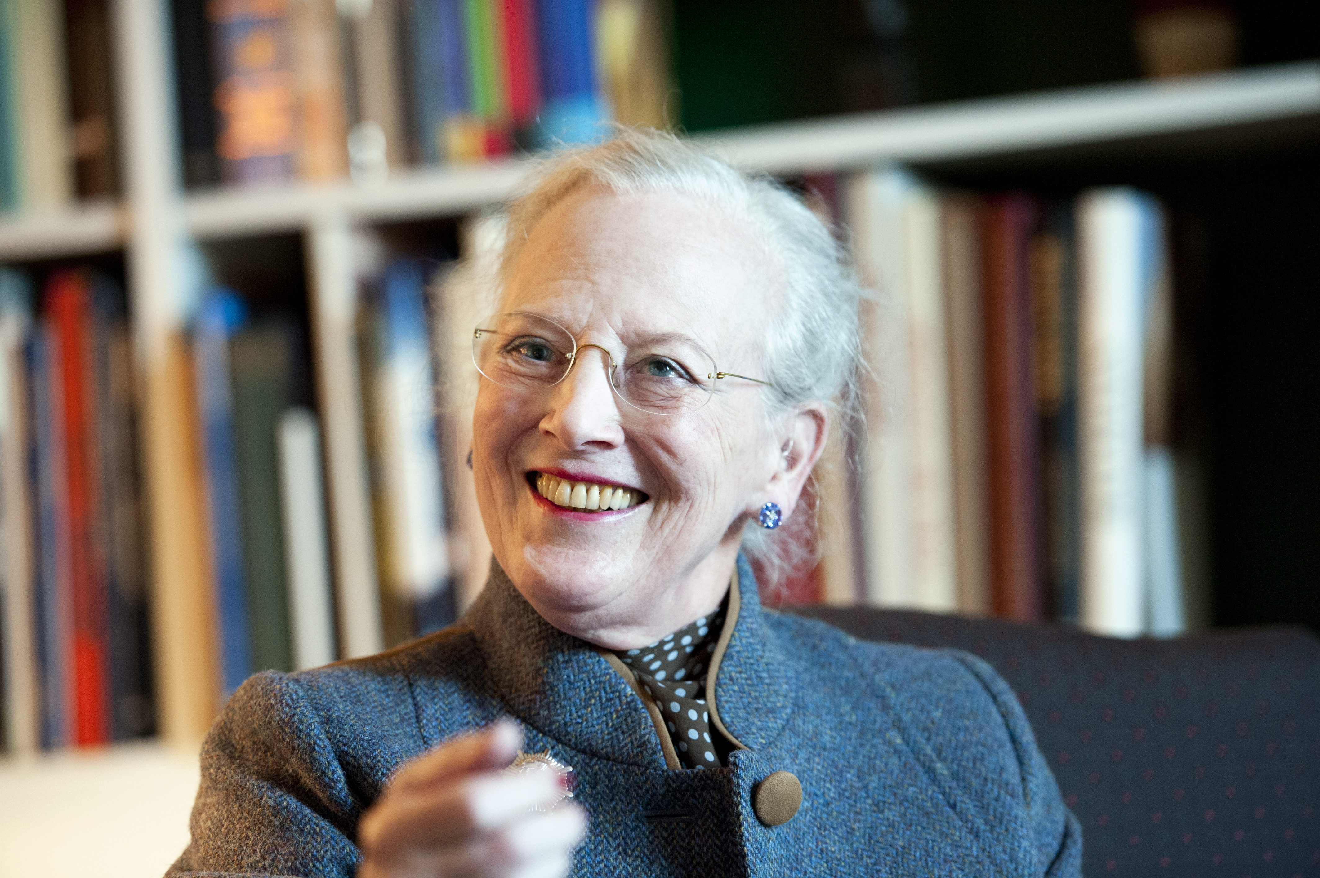 Drottning Margrethe av Danmark